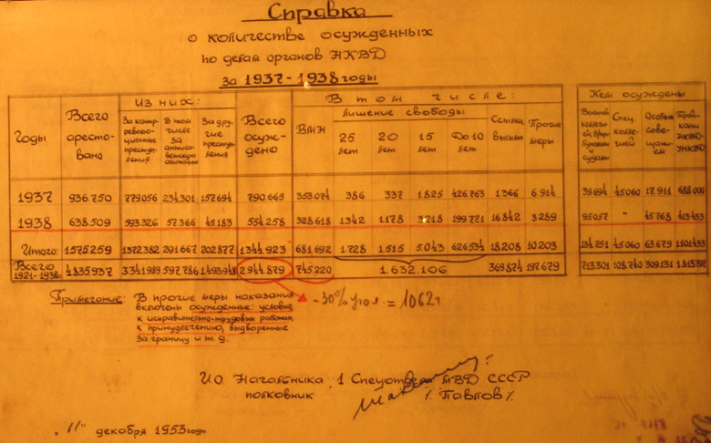 Справка спецотдела МВД СССР о количестве осуждённых по делам органов НКВД за 1937-1938 гг.